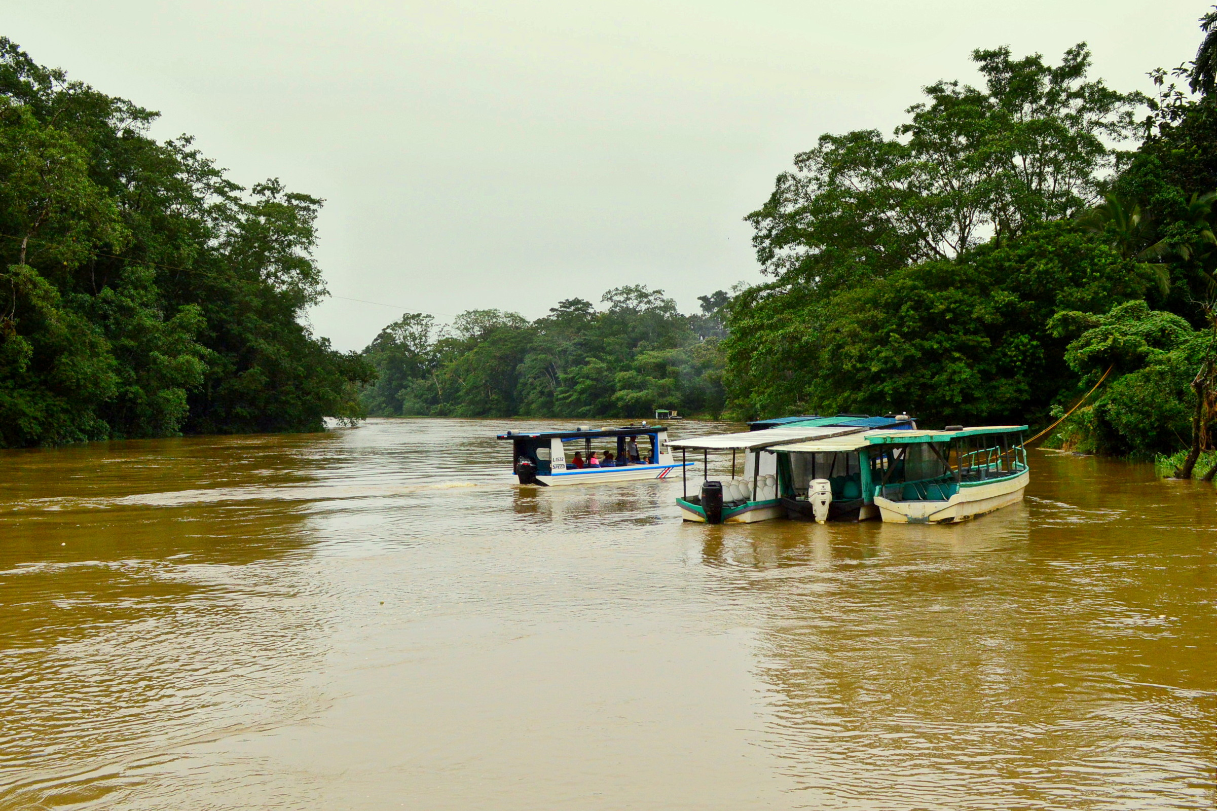 Río Sarapiquí, río más extenso de la Provincia de Heredia